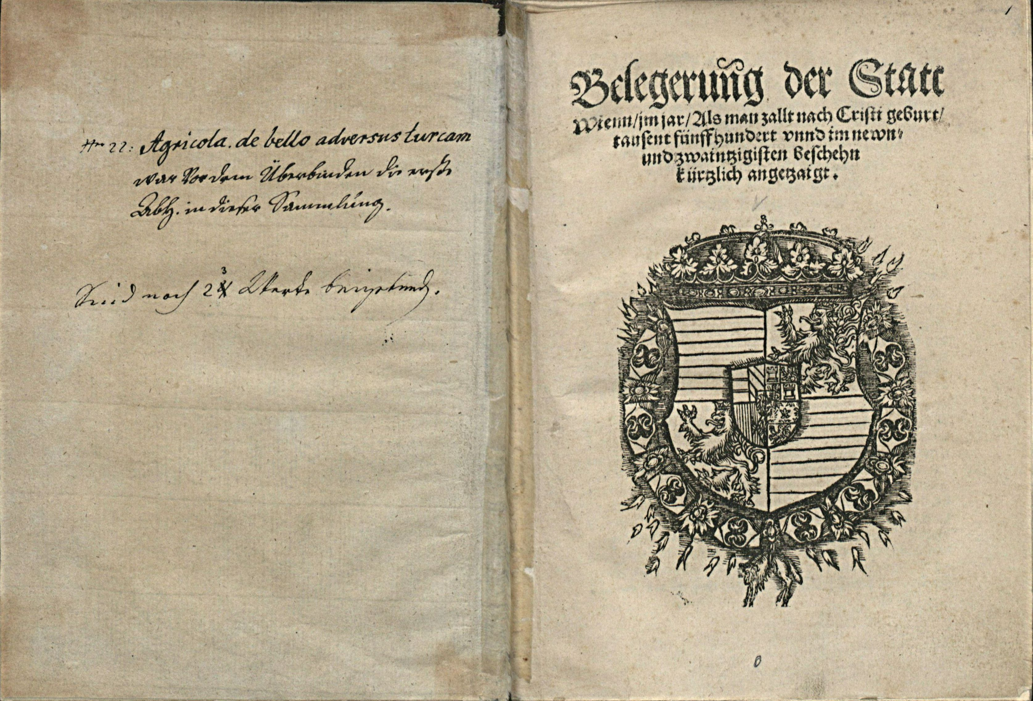 Belegerung der Statt Wienn im jar als zallt nach Cristi geburt 1529: kürtzlich angezaigt, Wienn, Hieron. Vietor., 1529